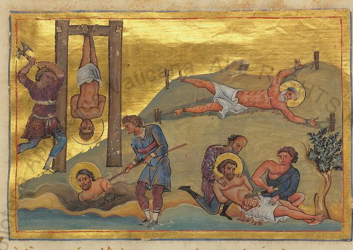 Мученики Васс, Евсевий, Евтихий и Василид Константинополь. 985 г. Миниатюра Минология Василия II. Ватиканская библиотека. Рим.